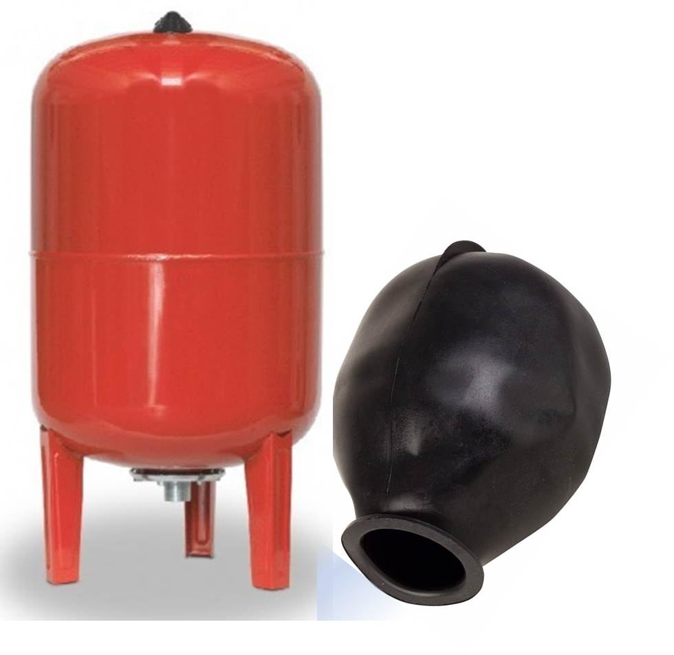 Depósito de presión hidroneumático y su membrana